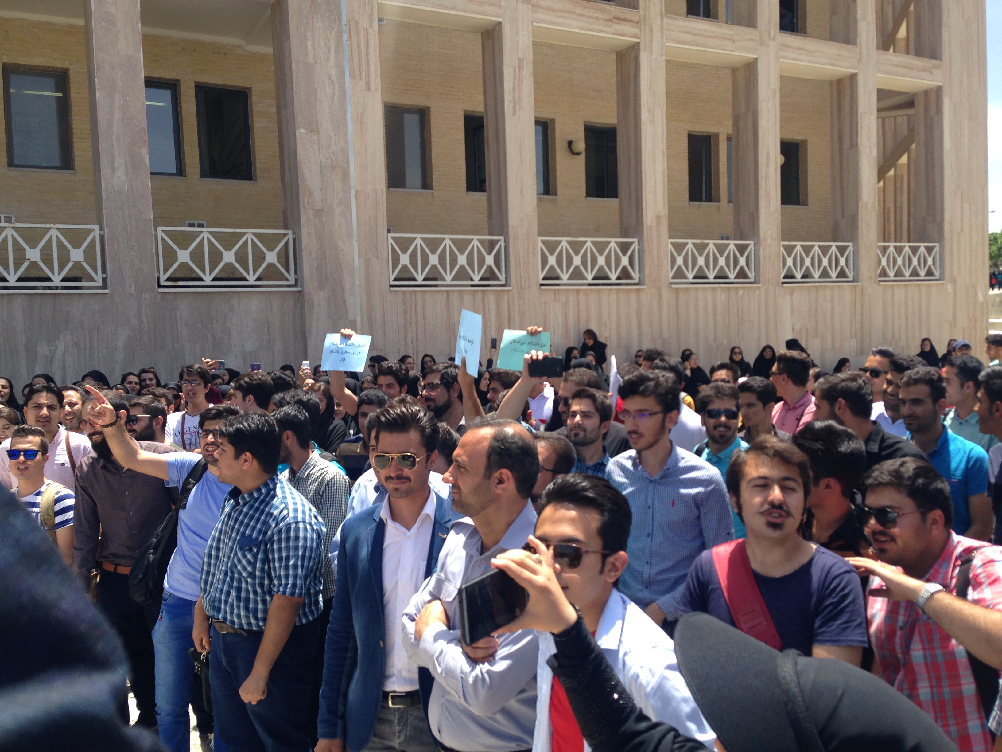 تجمع صنفی دانشگاه آزاد اسلامی واحد اصفهان (خوراسگان) در تاریخ 2 خرداد 1396